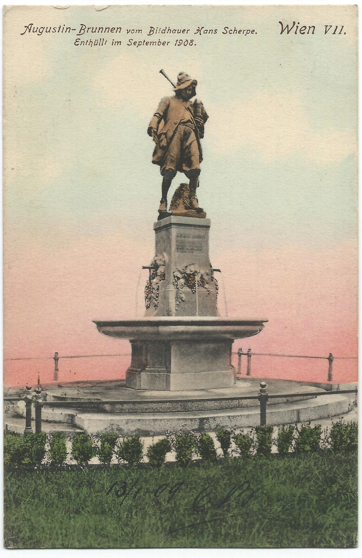 Vue de Vienne au début du XXe siècle.